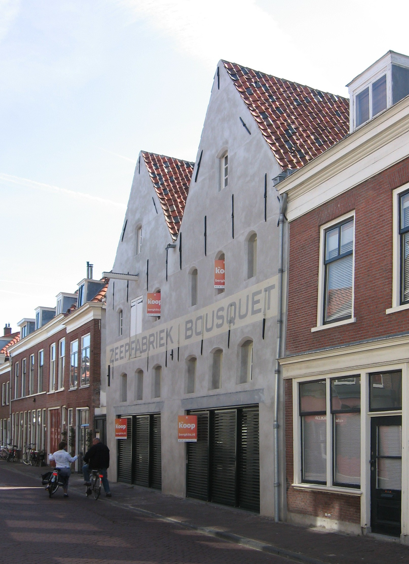 Delft - Molenstraat pakhuizen zeepfabriek, rijksmonument